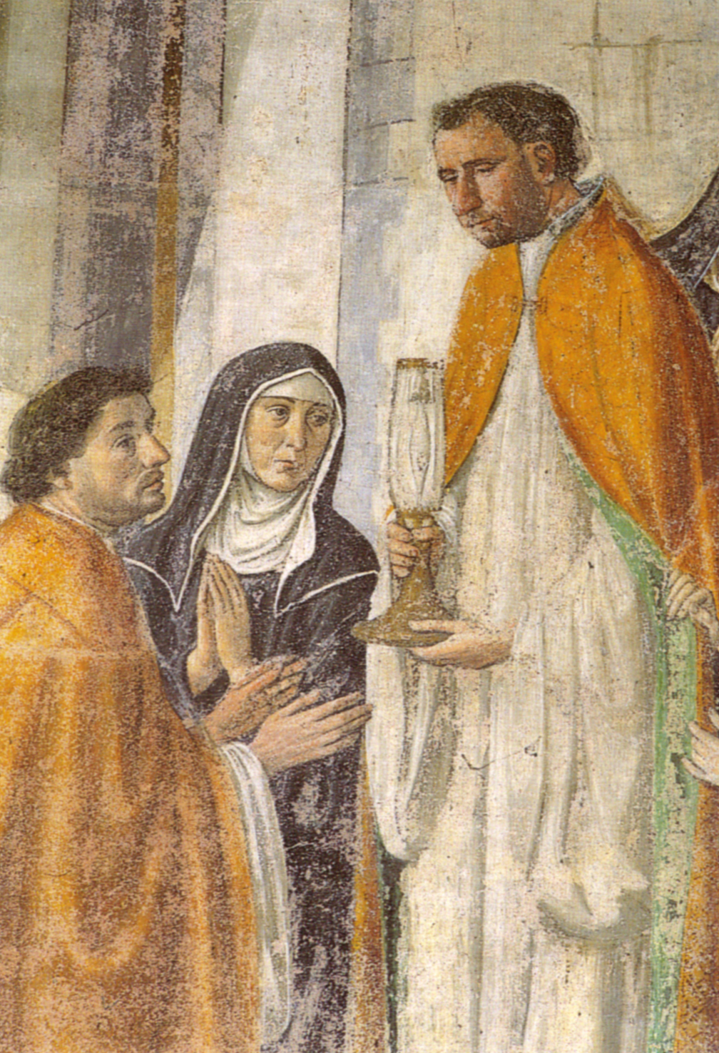 Cappella del miracolo, cosimo rosselli, miracolo del calice, dettaglio